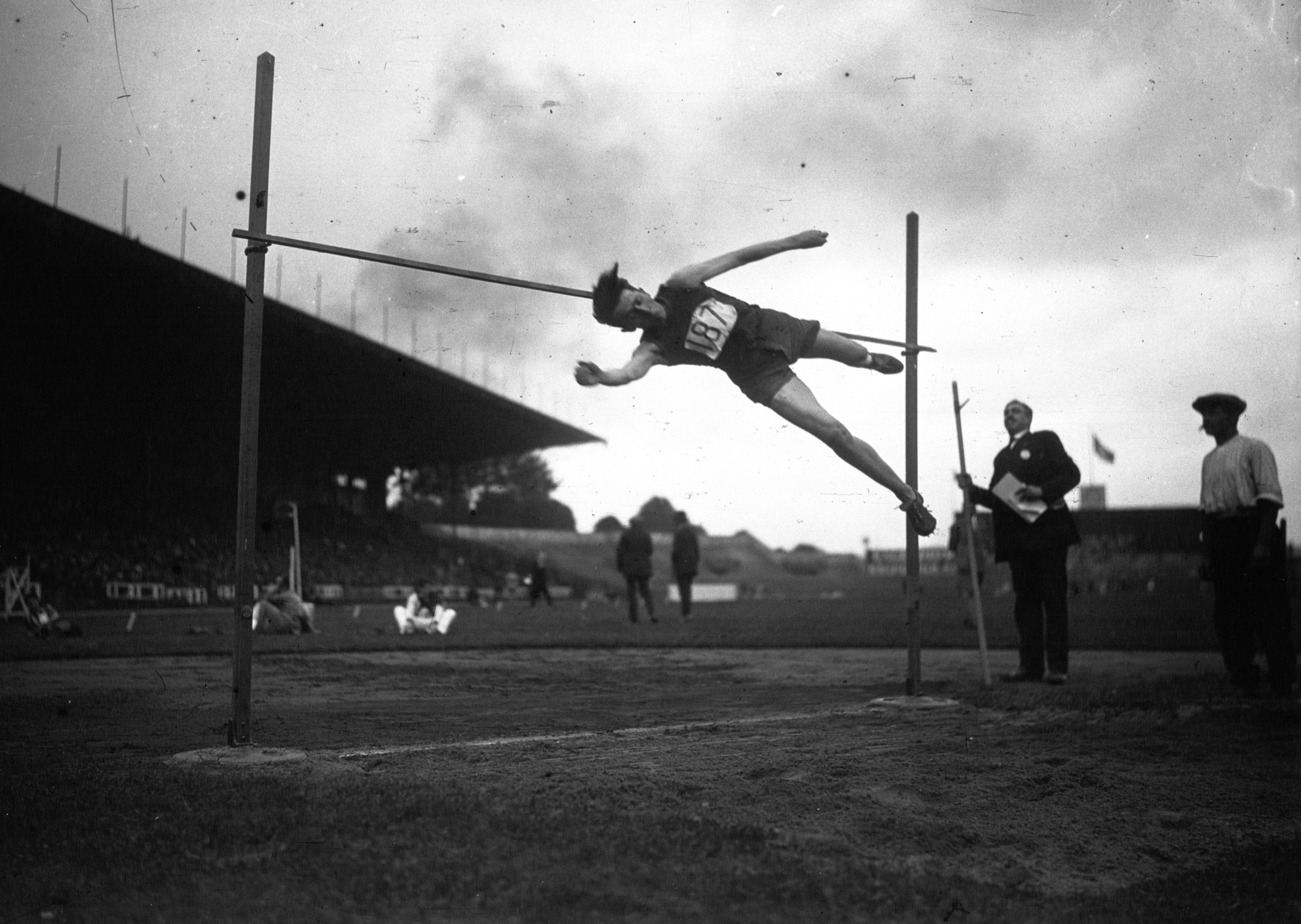 Colombes : championnats de France d'Athlétisme : un saut en hauteur de Ménard.